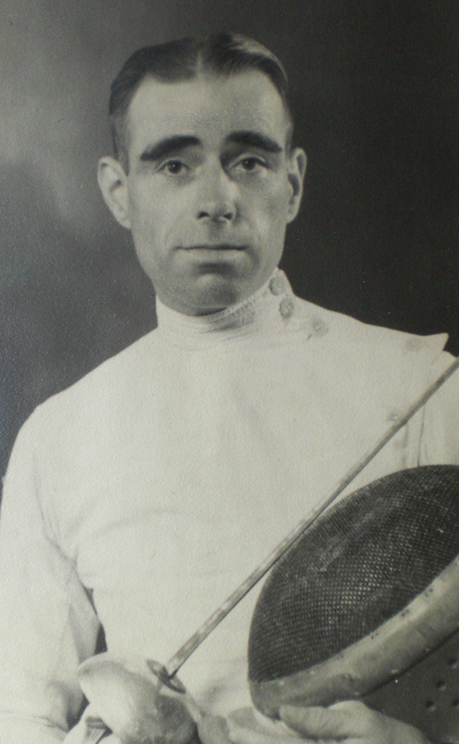 Portret van Johannes Adrianus Zoet, mijn opa, tijdens zijn schermcarriere. De foto is gemaakt door mijn oma en staat in een album dat in het bezit is van zijn dochter (mijn moeder)